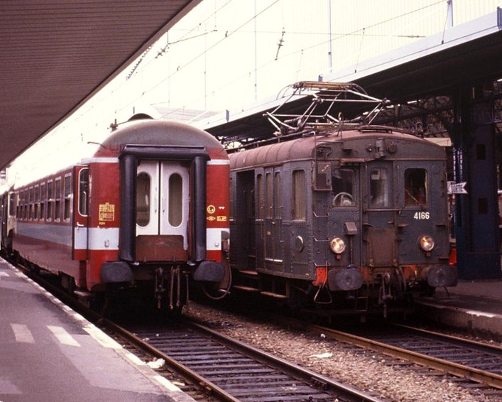 La Z 4166 à Bordeaux au côté d'une voiture A9r UIC-Y en 1980.